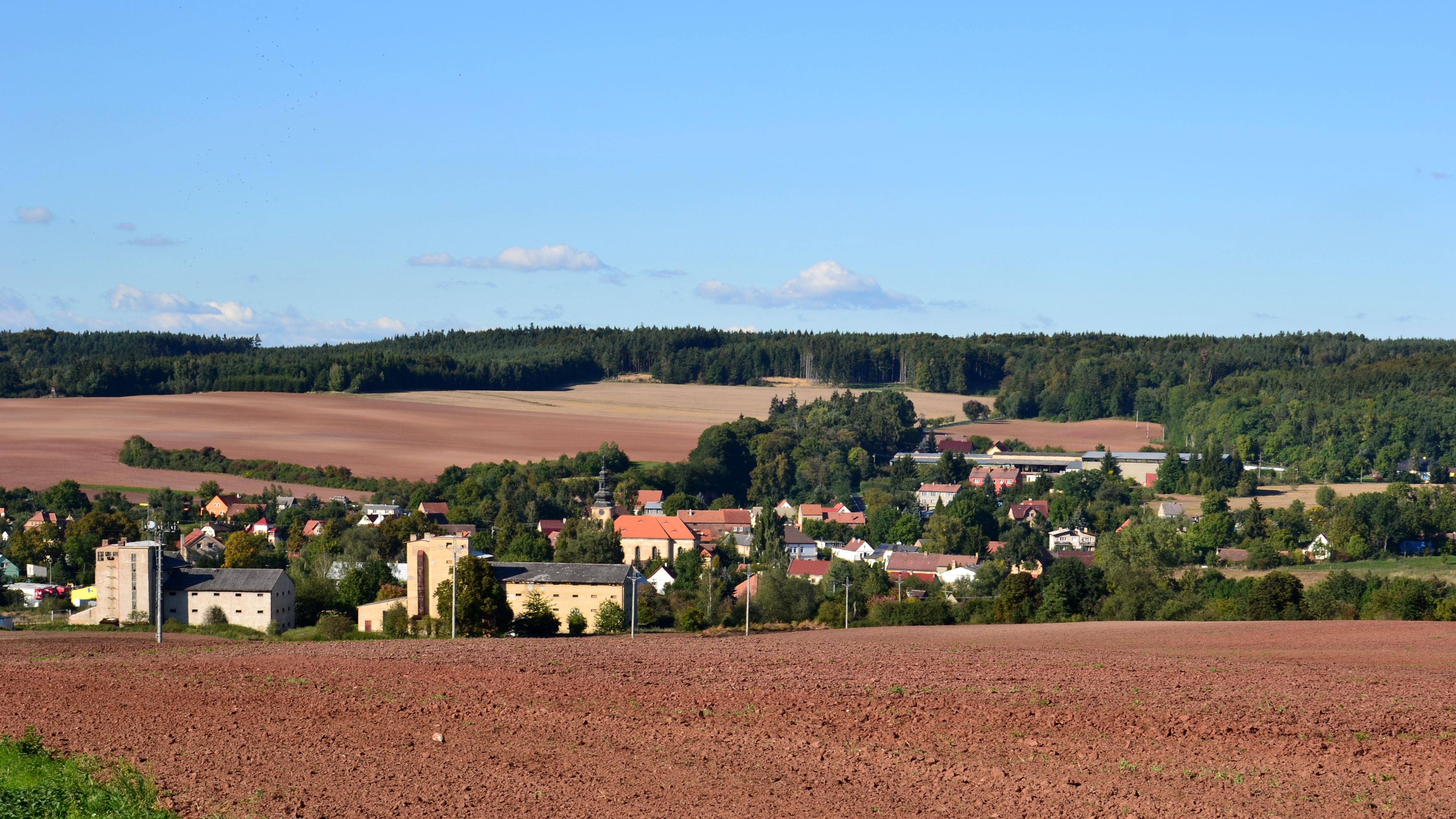 Pohled od jihu